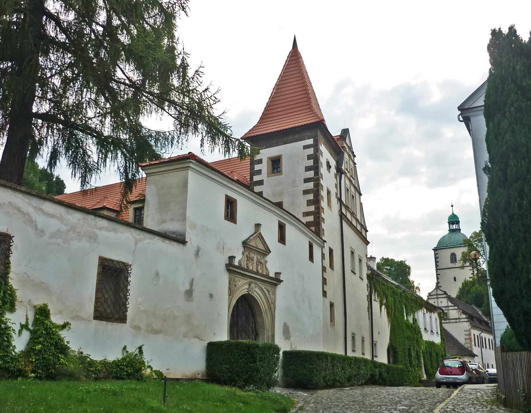 Oberes Schloss in Bensen (Benešov nad Ploučnicí), hier Starschedel-Haus (Starschedelovský dům), Schönfeld-Haus (Schönfeldovský dům oder Ballamský dům) und Konojedsky-Haus (Konojedovský dům) (von links nach rechts)